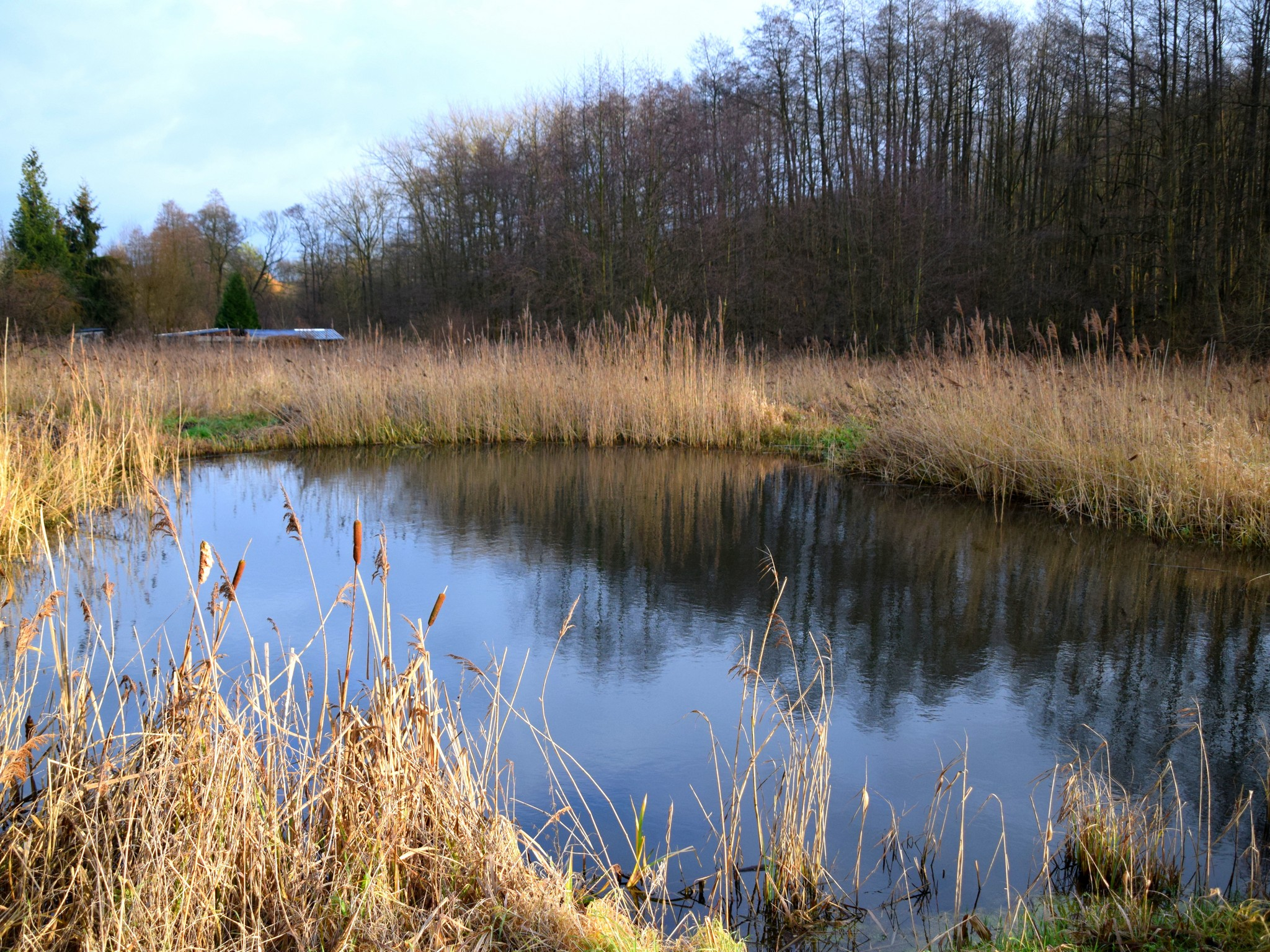 Teich am Am Weinberg Frankfurt (Oder)-Güldendorf